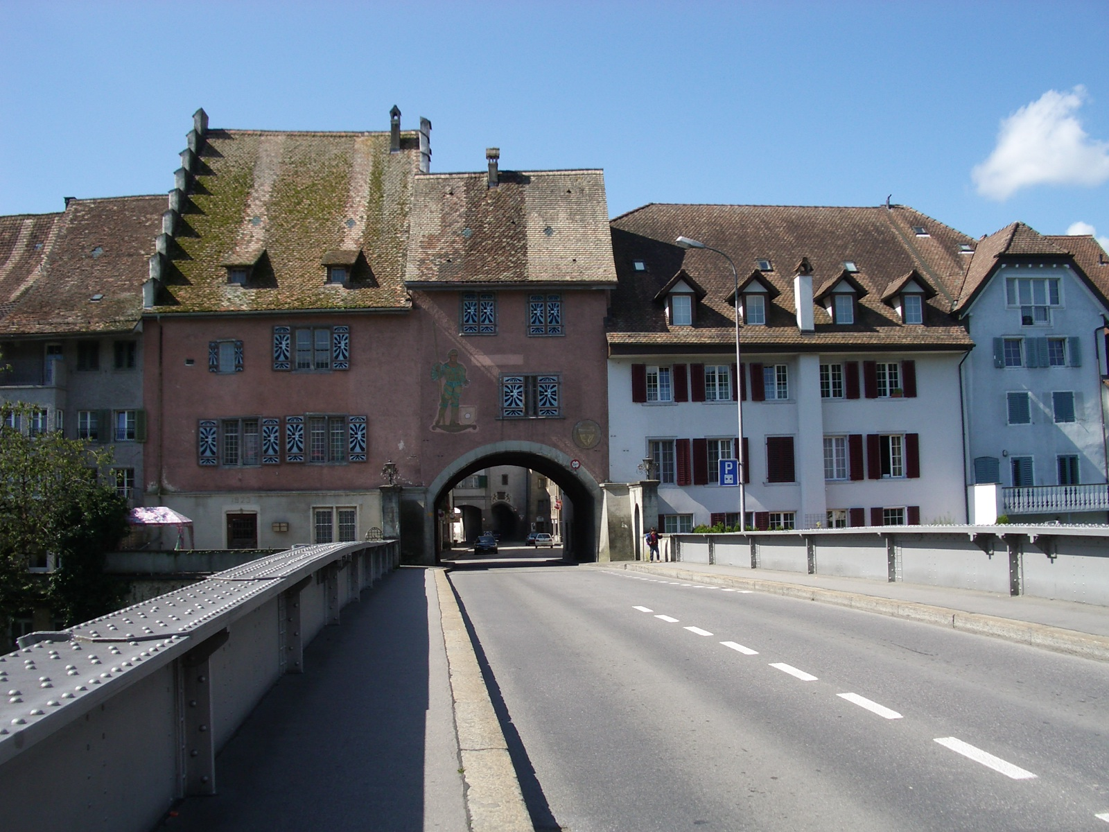 Mellingen AG, Switzerland self-made, August 2006